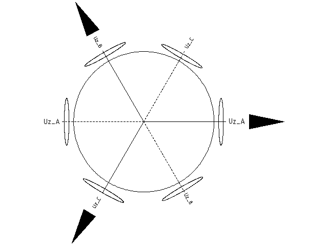 Rozkład uzwojeń w silniku trójfazowym